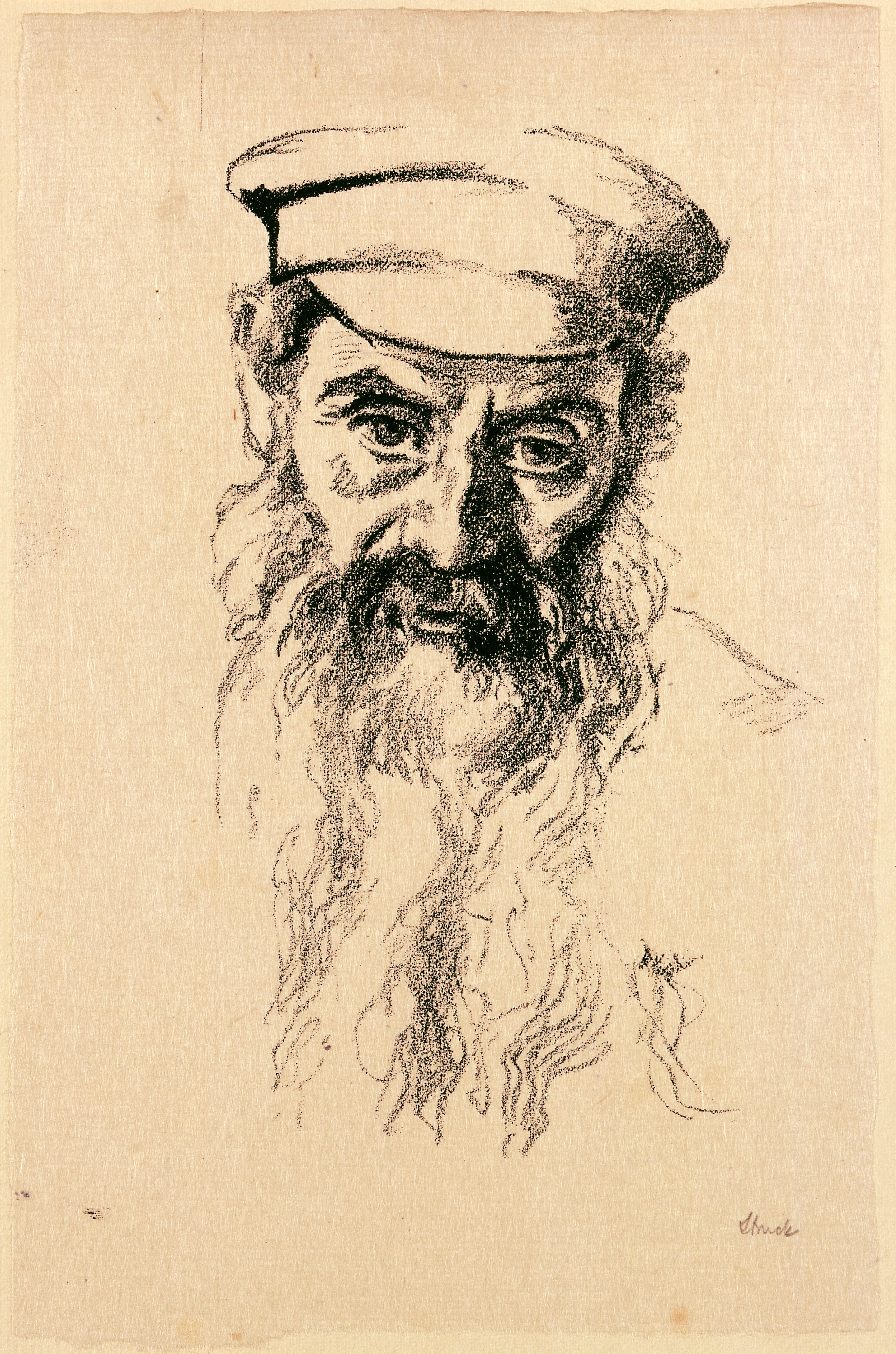 Artwork by Hermann StruckDargestellte Person: Oberbefehlshaber Ost, DNB-LinkDatierung Display: ca. 1916Bezug: Aus der Mappe "Skizzen aus Russland. Ostjuden"Objektart: LithografieSchlagworte Inhalt /Geografie: Berlin, Ostjuden, Ostjude (Darstellungstradition), alter Mensch, Kopfbedeckung, Bialystok, Mann, PorträtSchlagworte Kontext: Weltkrieg (1914-1918), Jüdische Renaissance, Wehrdienst